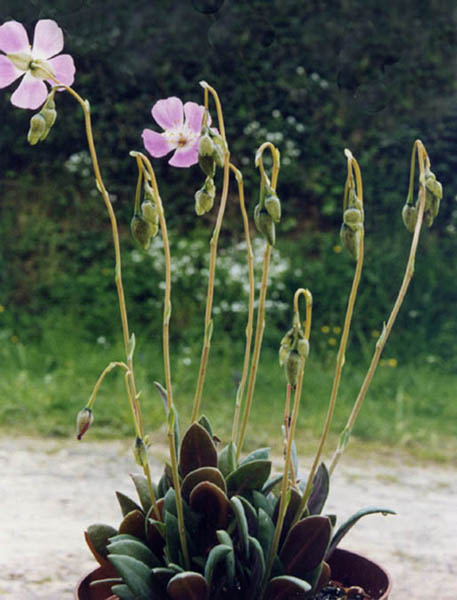 Calandrinia grandiflora